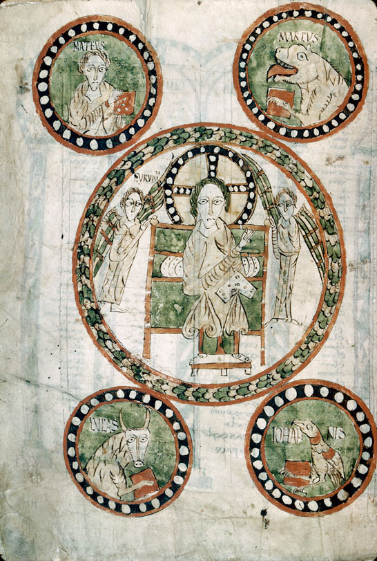 Christ en gloire, Anges et Tétramorphe. F° 12v. Autun, Bibliothèque Municipale. Ms 3.